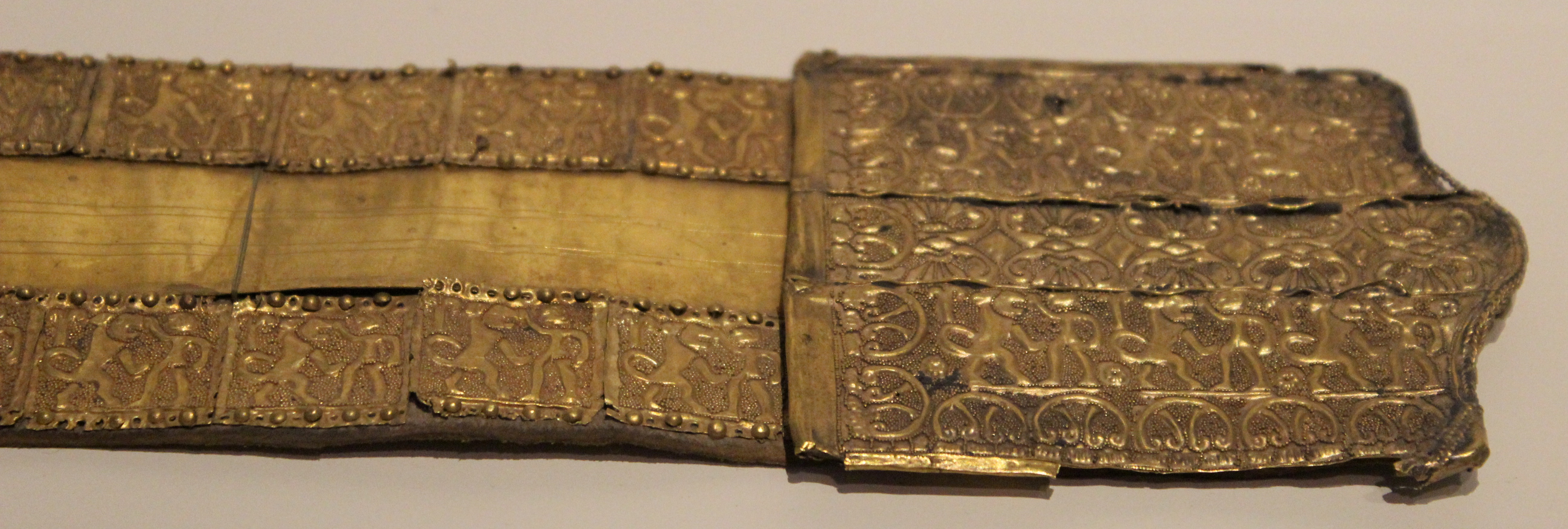 Madrid, M.A.N. Tesoro de Aliseda, cinturón.